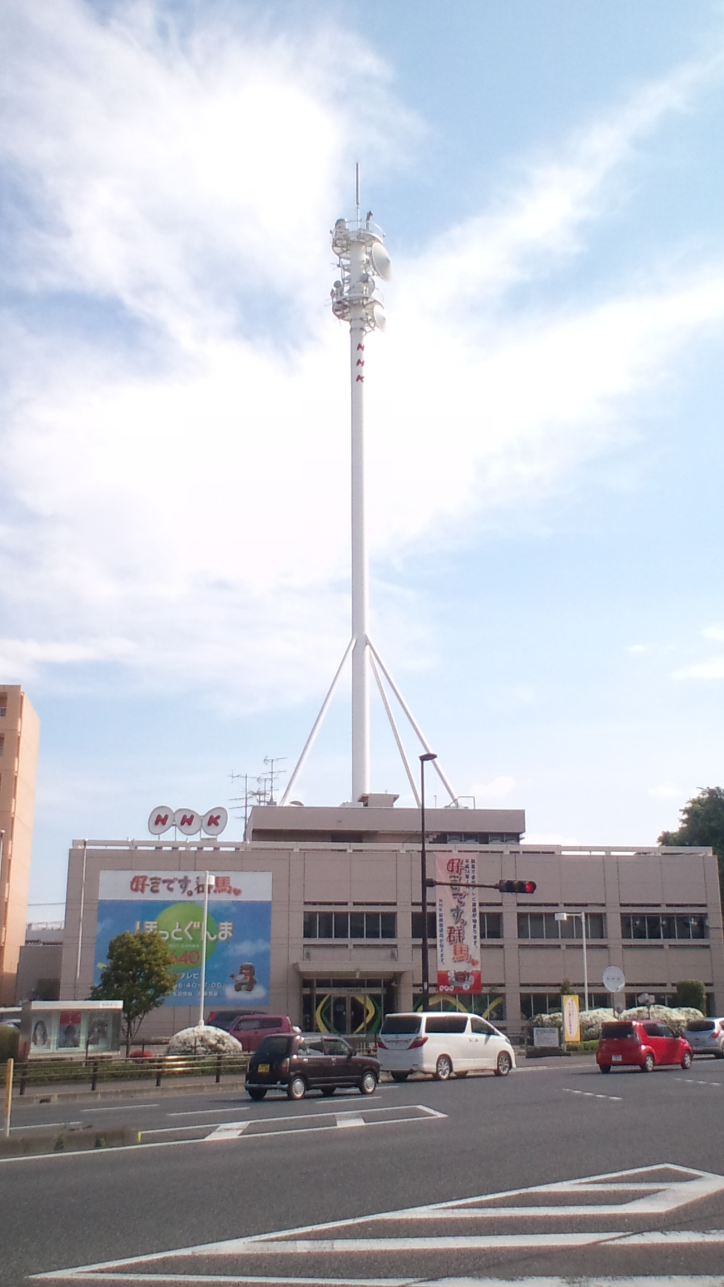 地デジでの県域放送化が終了した後の建物